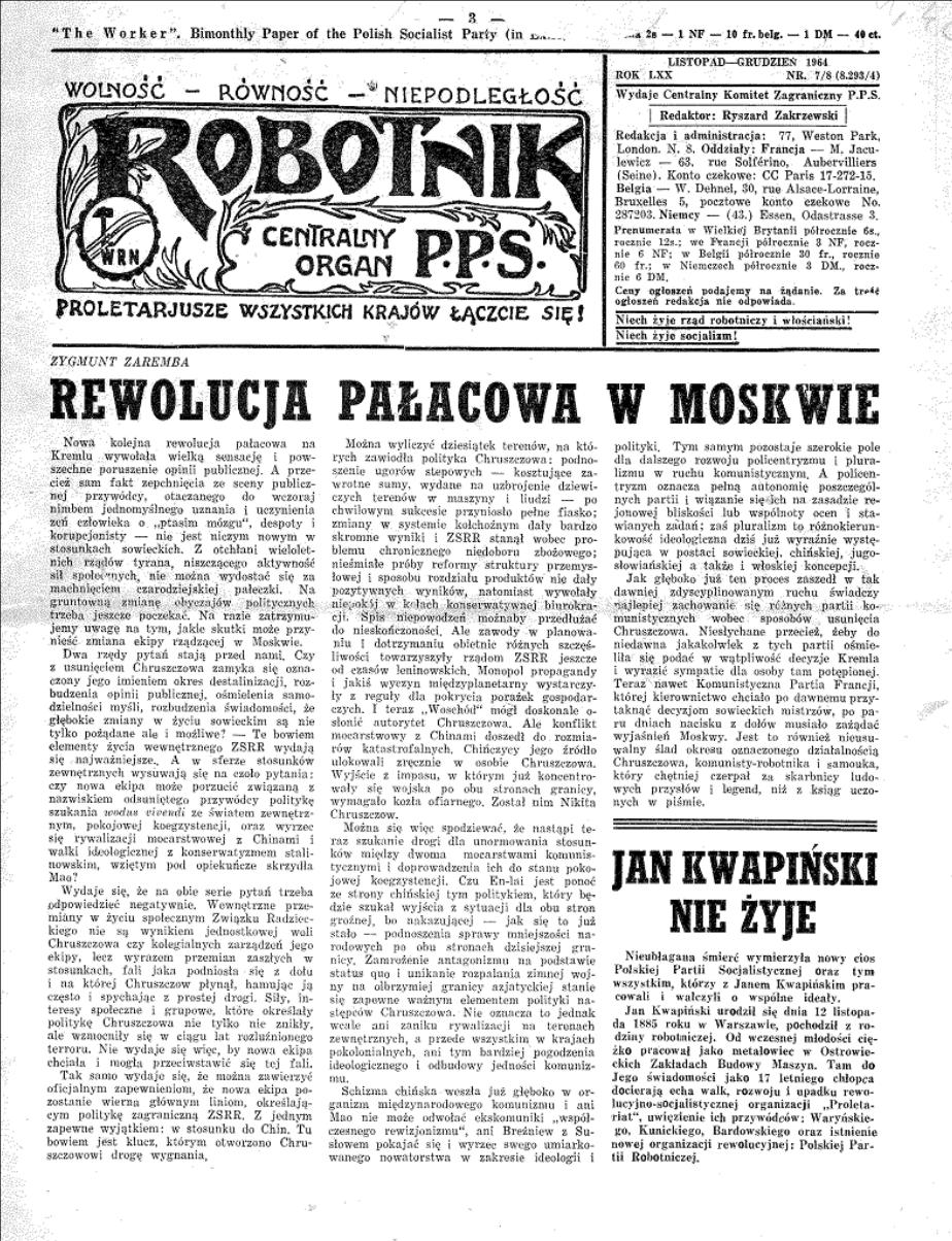 "Robotnik" PPS Londyn 1957